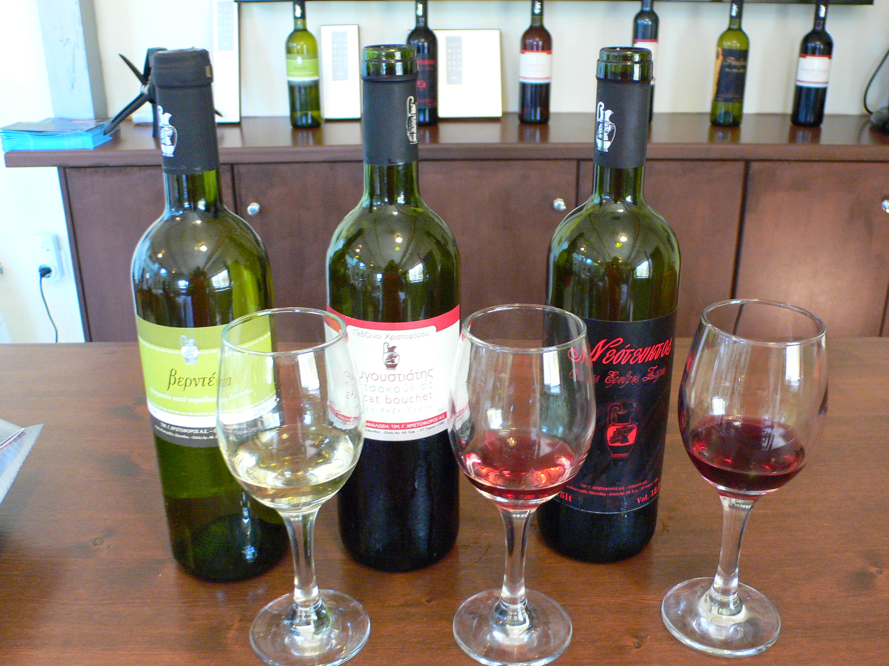 Vins grecs en dégustation à Zakynthos